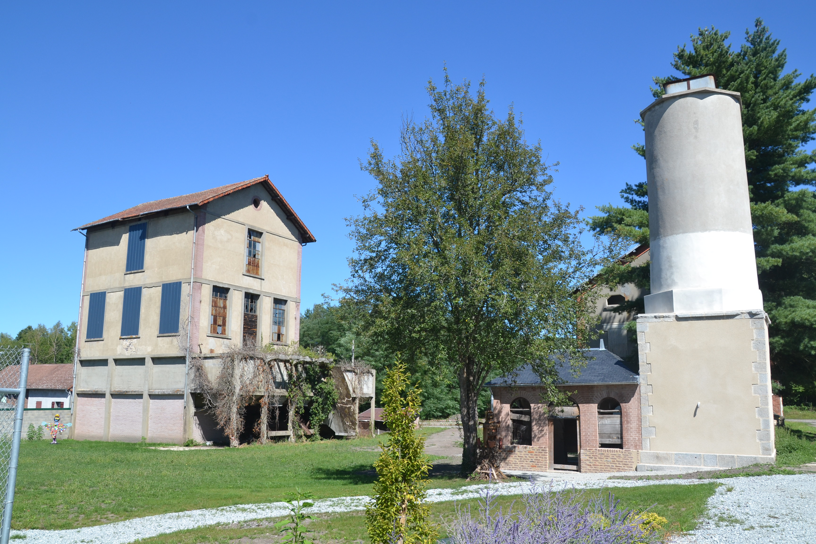 Sur la gauche, l'ancienne laverie (lavoir à charbon) des mines de charbon de Lavaveix-les-Mines (Creuse, France), sur la droite l'ancienne cheminée du puits Central transformée en château d'eau.